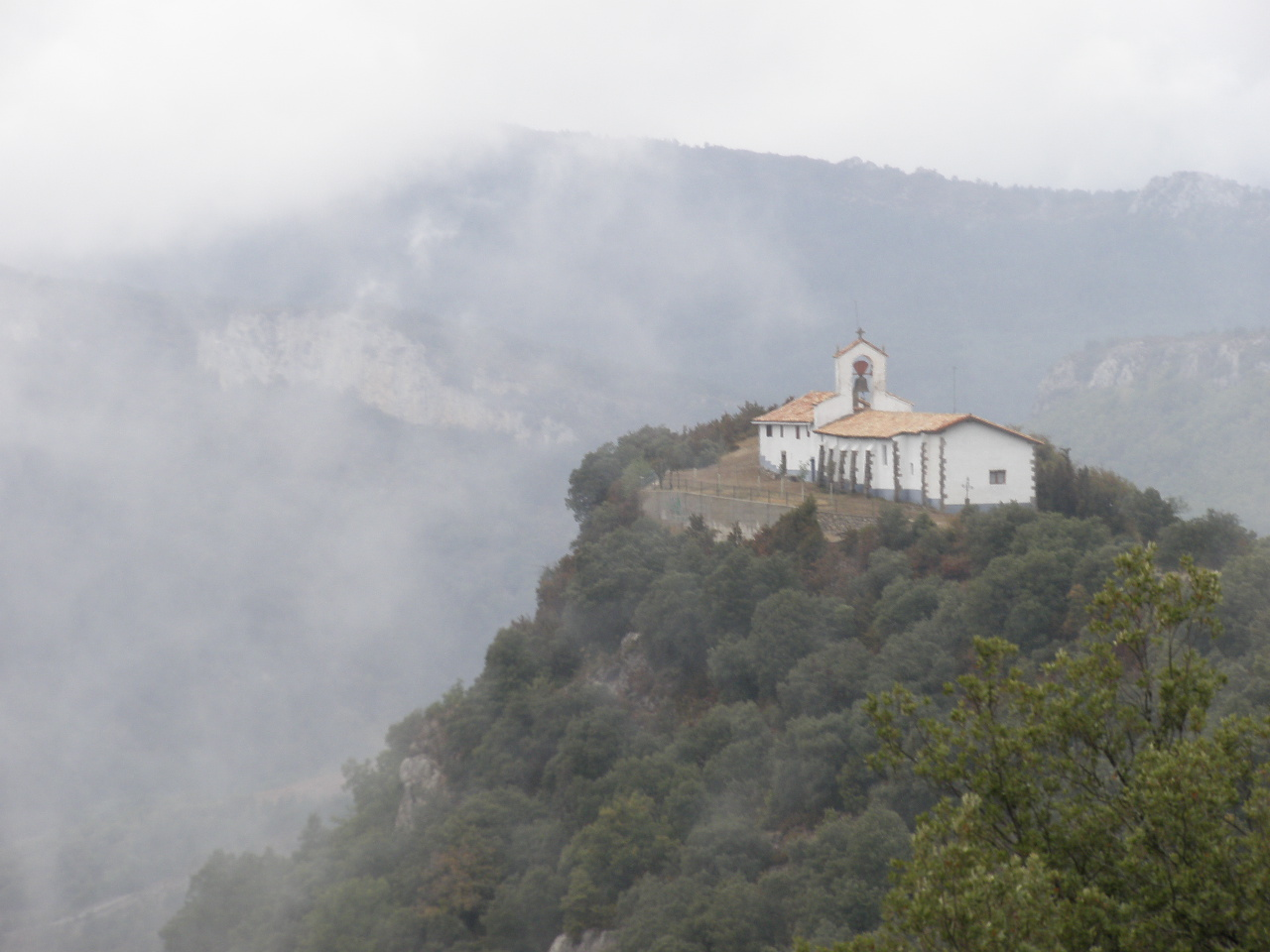 Nª Señora de Arburua